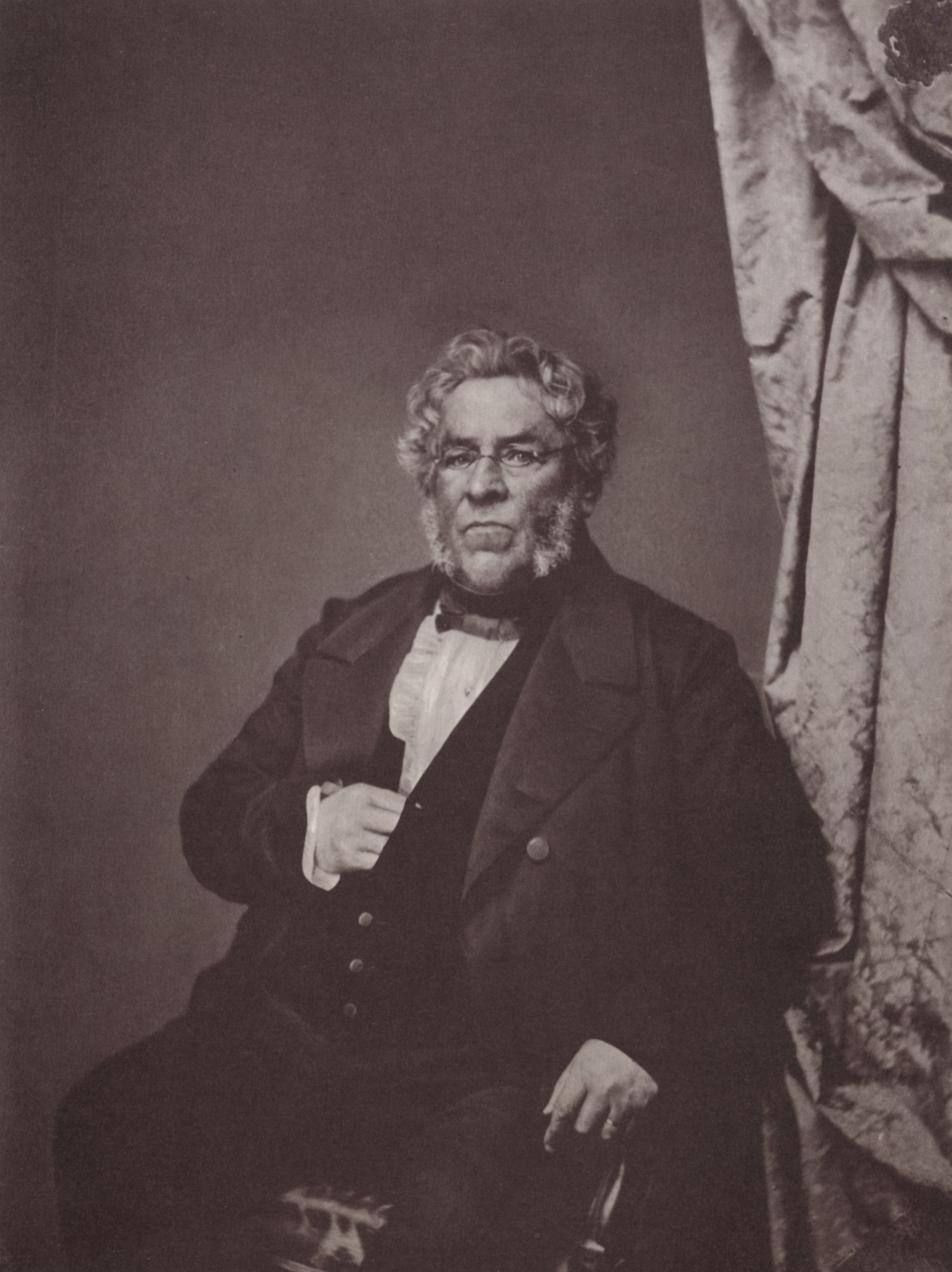 Joseph Anton von Maffei (1790-1870); Fotograf: Franz Hanfstaengl